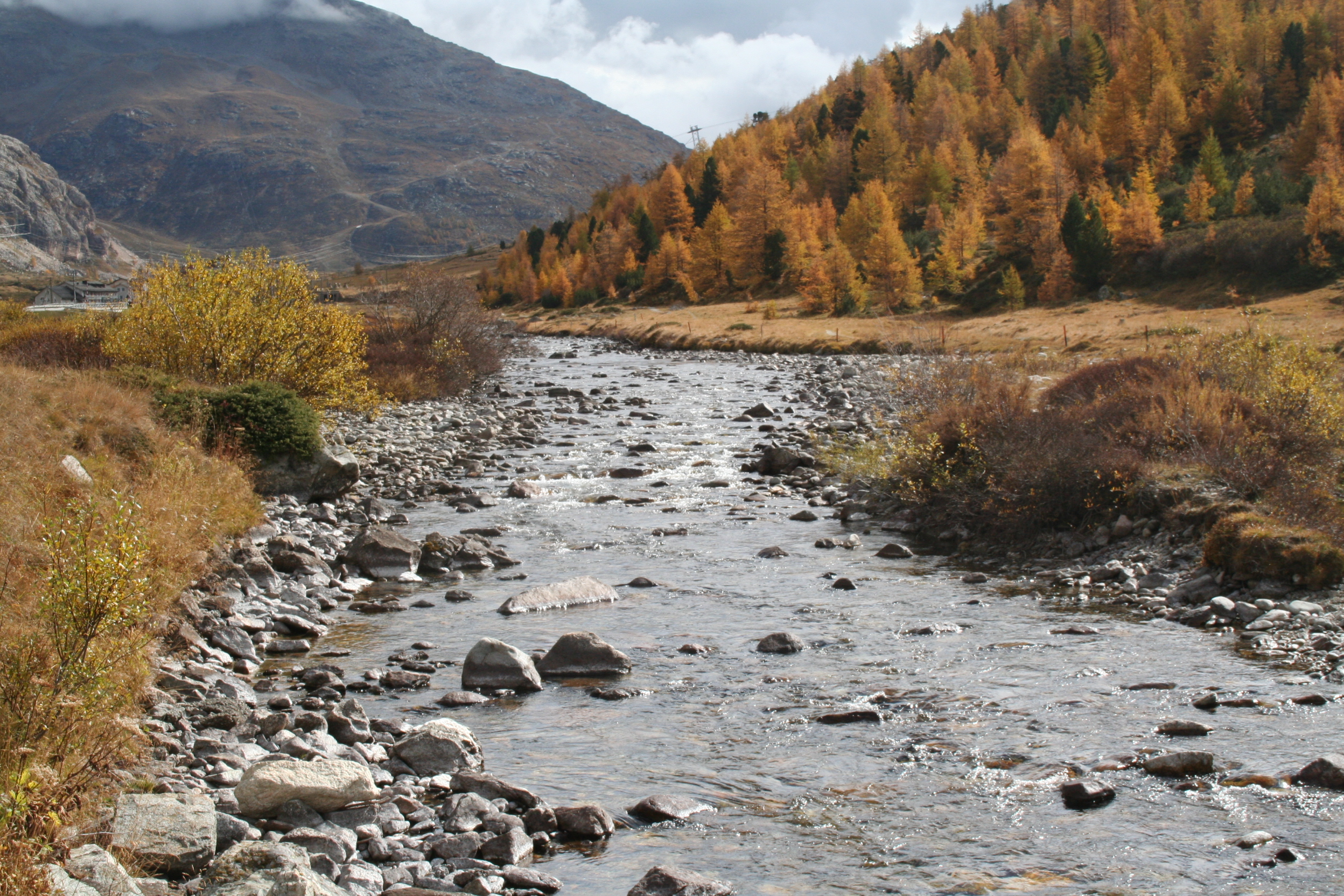 Berninabach